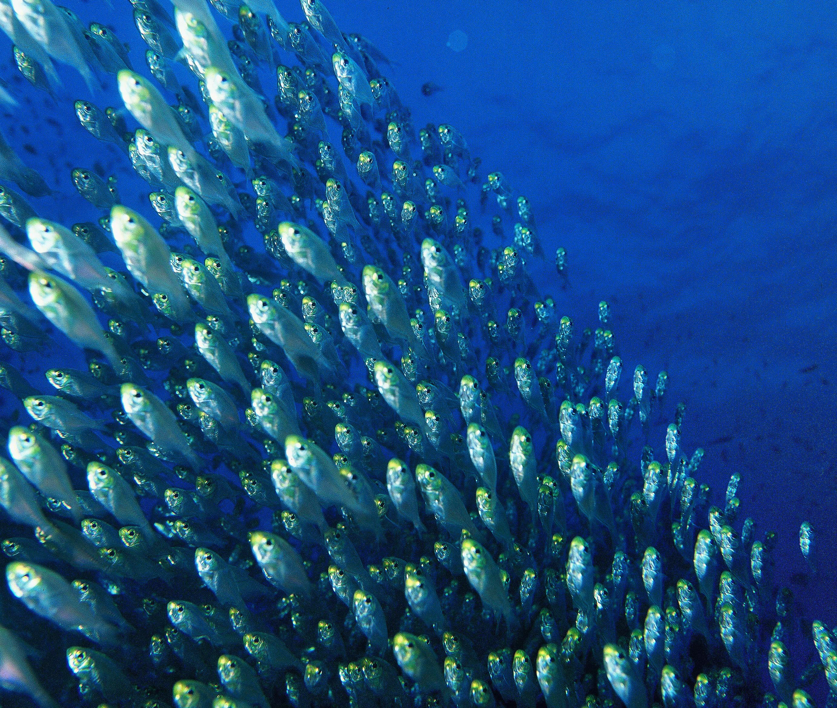 School bijlvissen uit de Rode Zee.